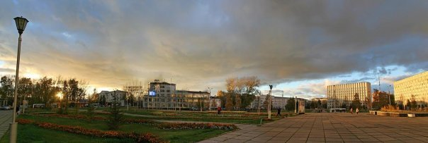 Наша гордость